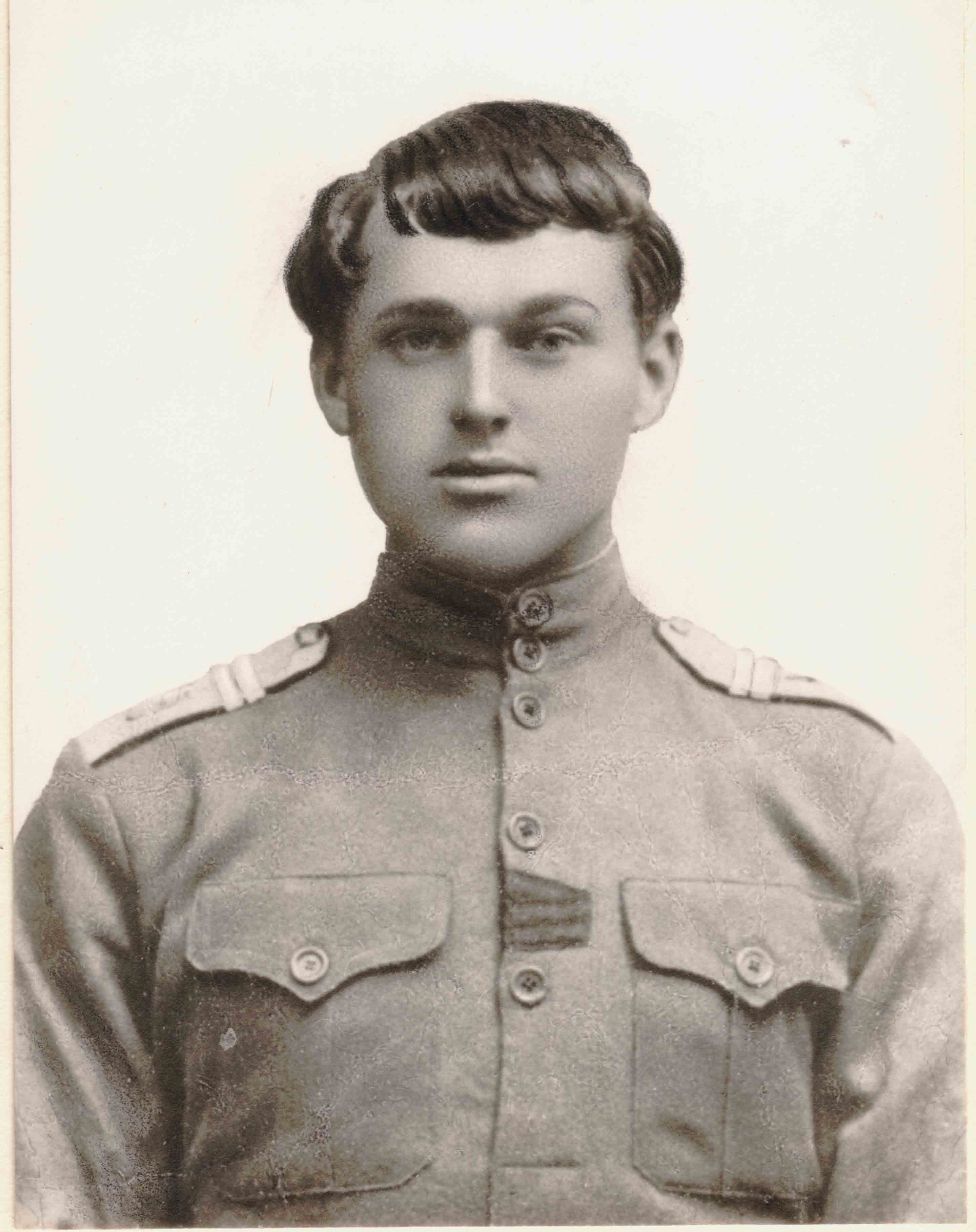 Мл. унтер-офицер К. Рокоссовский. 1917 год.